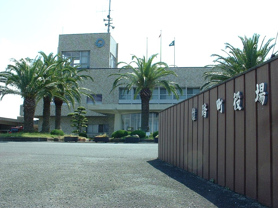 雄踏町役場 雄踏町役場→浜松市雄踏総合事務所 と変遷してきた